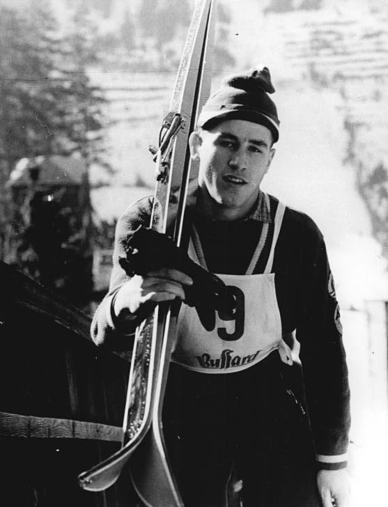 Zentralbild Dressel 18.2.1961 Jungmann Bokeloh überflügelte alle Am Freitag, dem 17.2.1961, überraschte der 17 jährige Bretteroder Armeesportler Dieter Bokeloh, die Zuschauer, denn bei allen Sprüngen in der Jungmannklasse kam er über die 70-m-Marke, die er als einziger unter den 36 in beiden Klassen gestarteter Nordisch-Kombinierten übertraf. UBz: Dieter Bokeloh auf dem Wege zum Sprungturm.